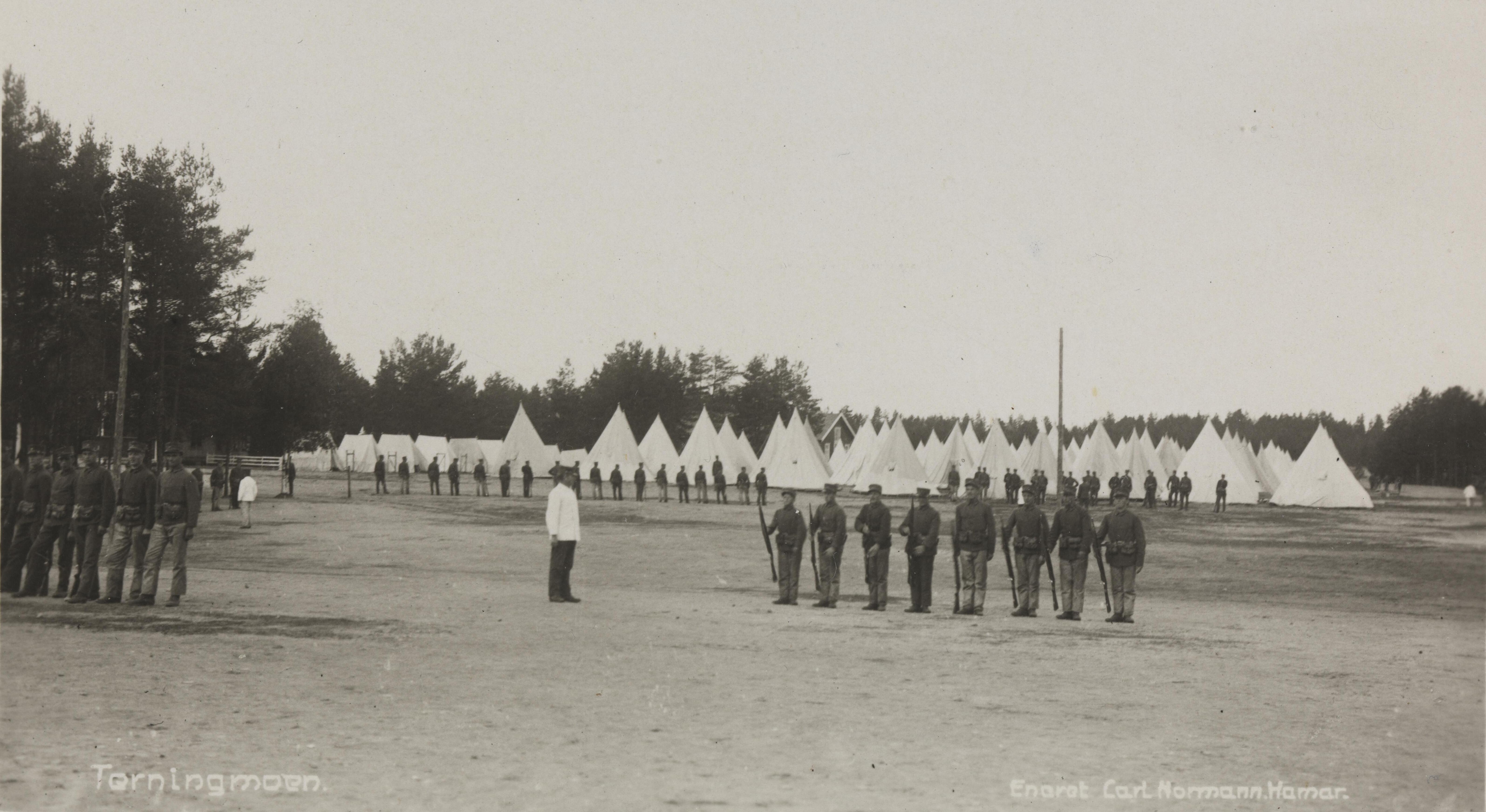 Bildet er hentet fra Nasjonalbibliotekets bildesamling Terningmoen, Elverum, Hedmark